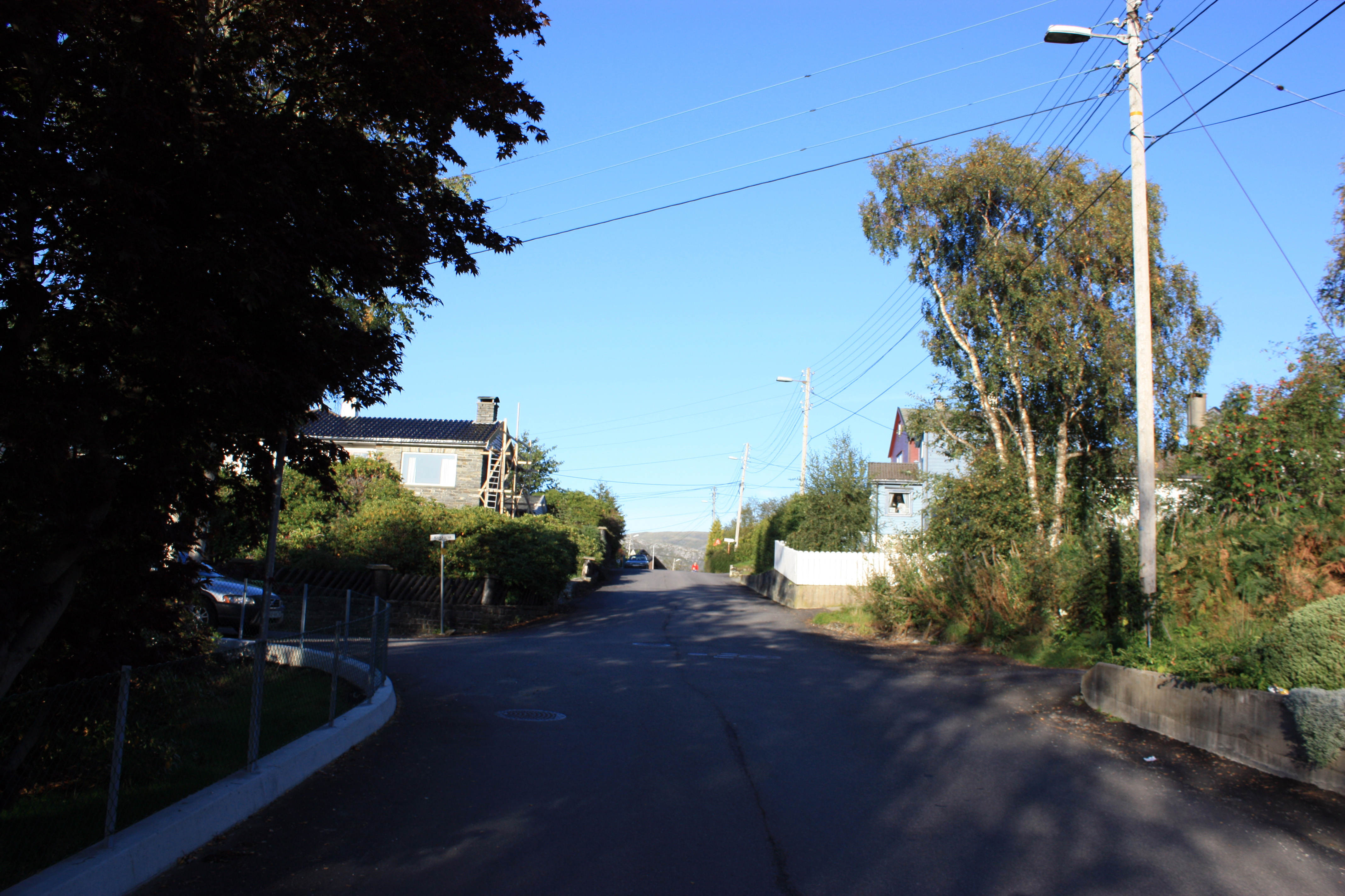 Solåsen, Fana, Bergen.